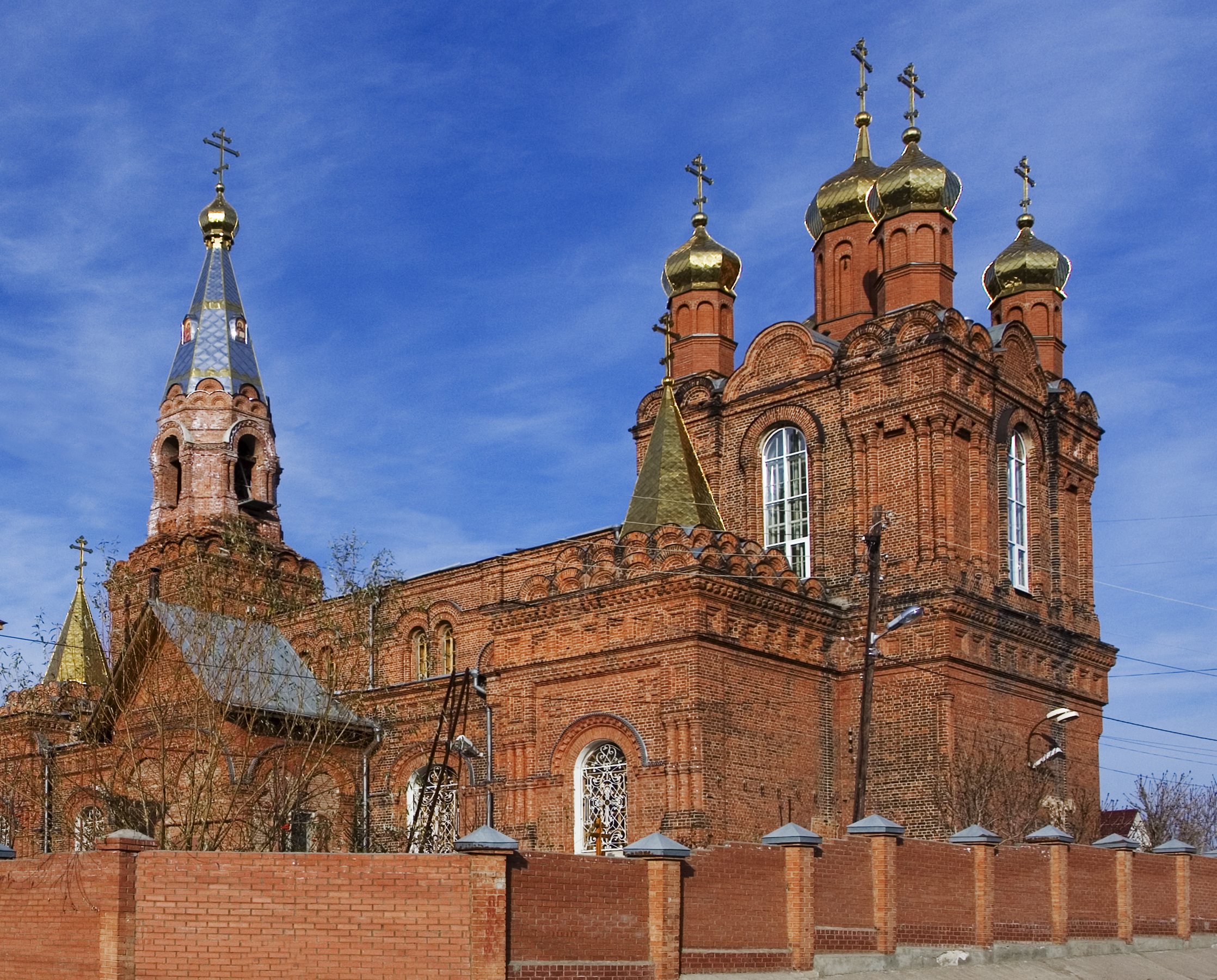 Самара, Храм во имя Архистратига Божия Михаила